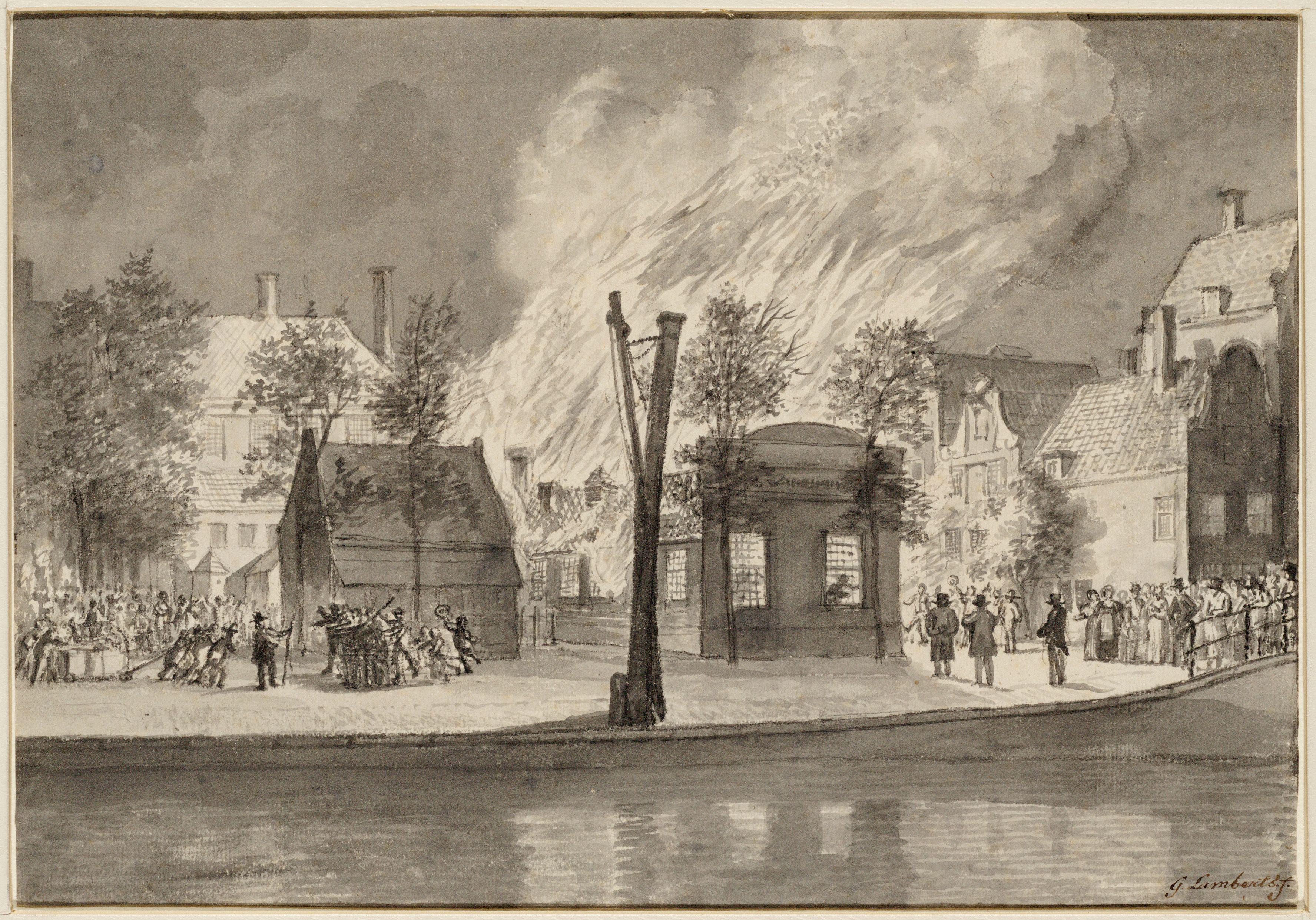 Herenmarkt van de Brouwersgracht af gezien tijdens het Soeploodsoproer, waarbij de soeploods in vlammen opging.